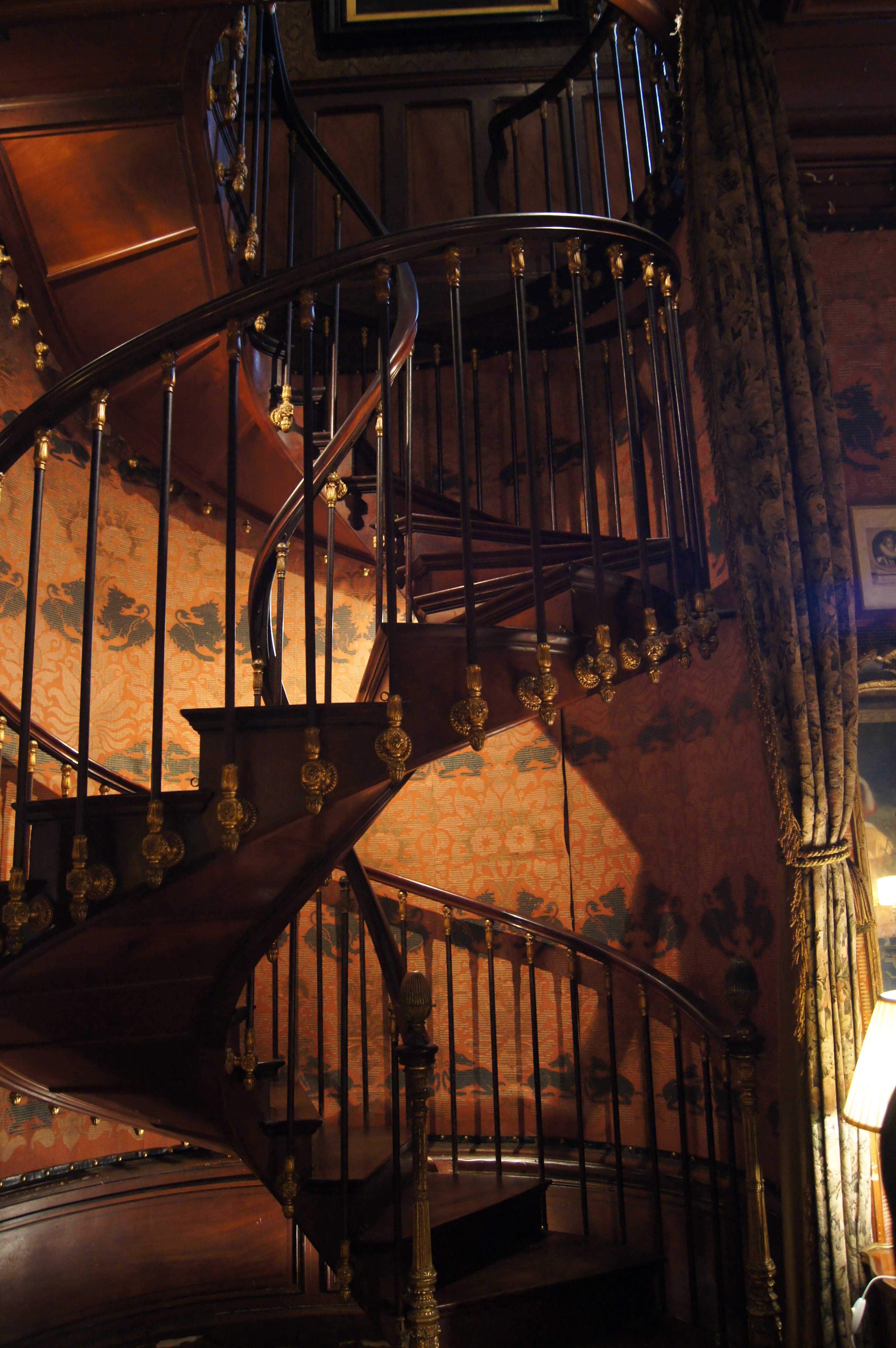 escalier en colimaçon au château de Montrésor, vu de la salle du billard